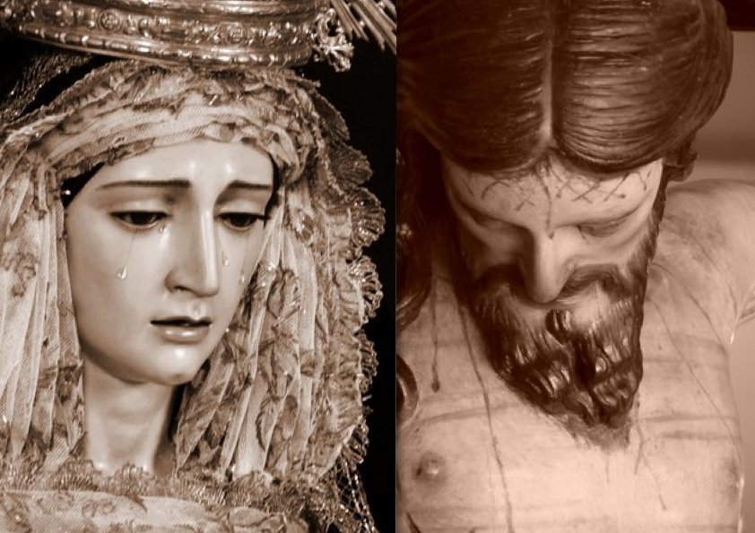 Cristo del Amor y Nuestra Señora de la Caridad. Málaga, España